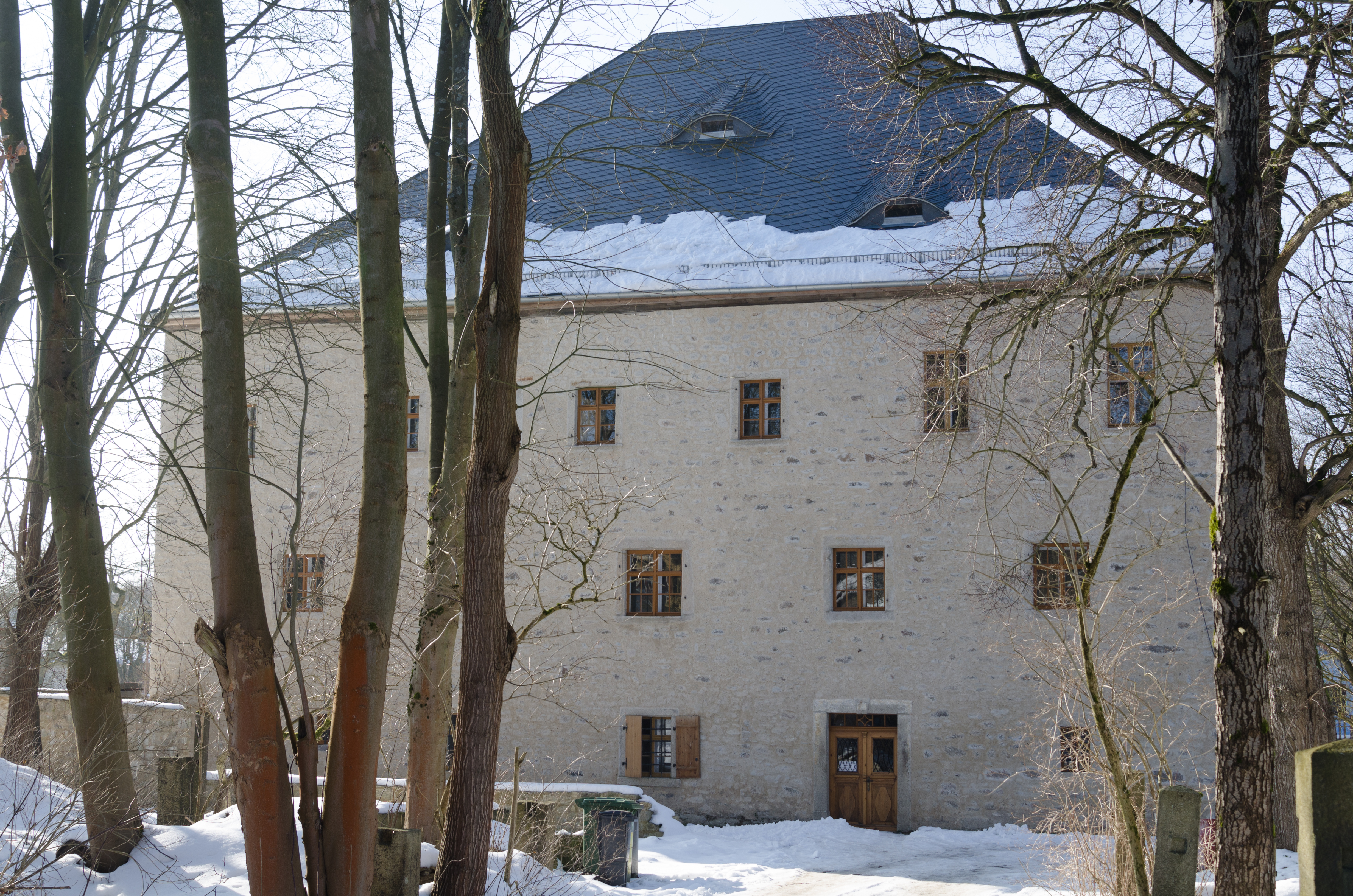 Kirchenlamitz, Schloßstraße 10